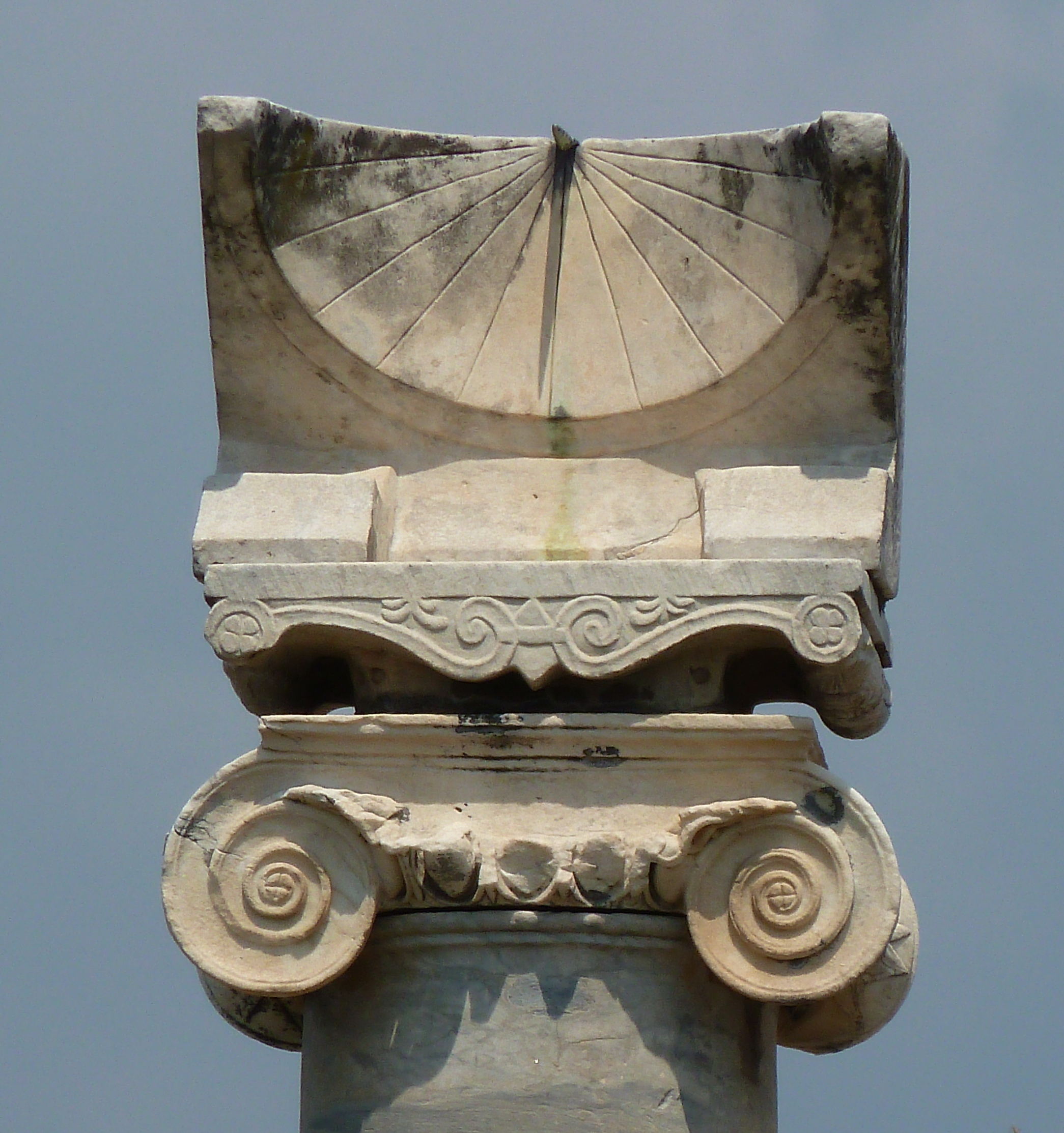 Pompéi, Temple d'Apollon, horloge solaire, détail, av. l'an 79.